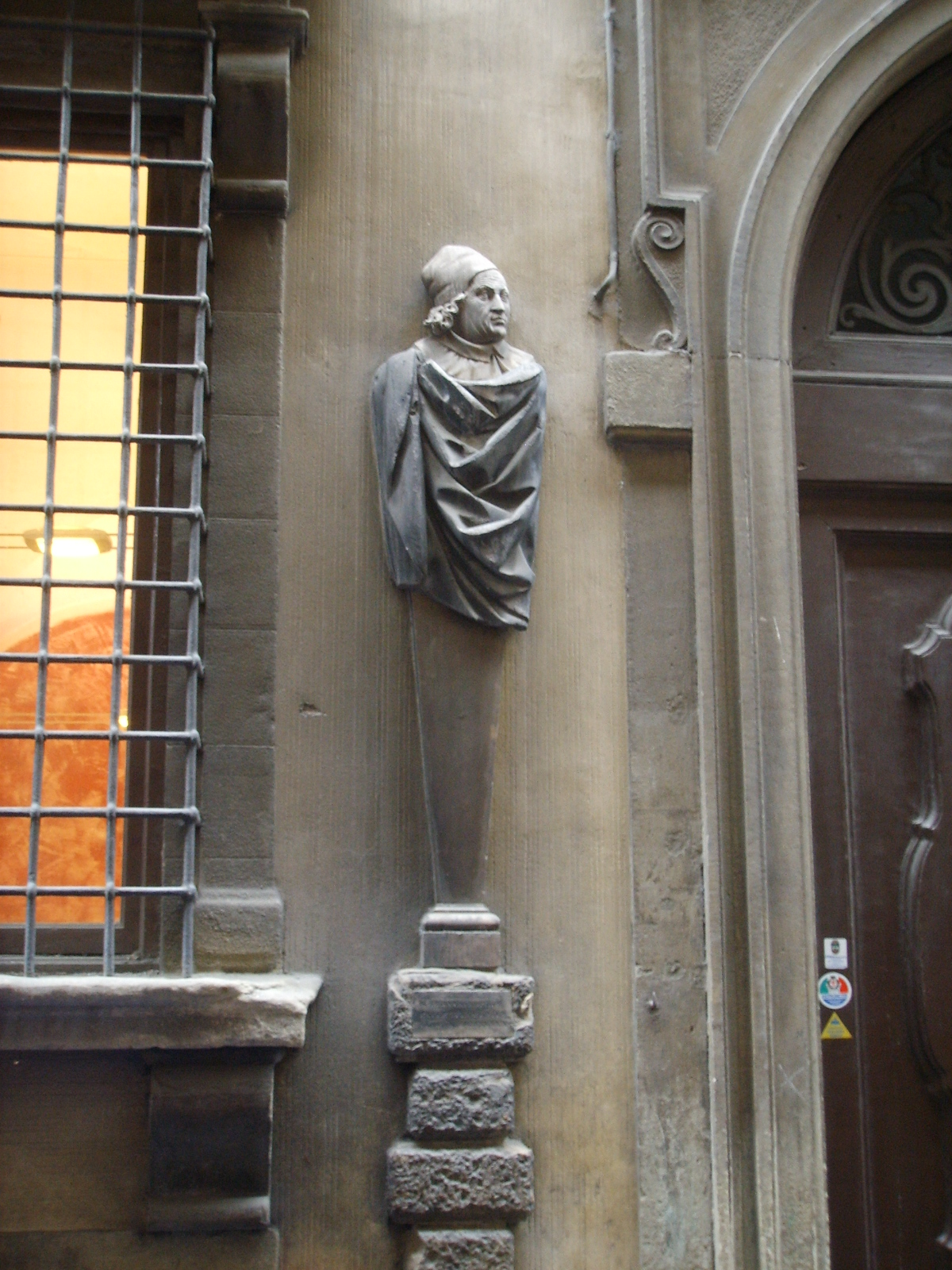 Palazzo dei visacci 04 Marsilio Ficino